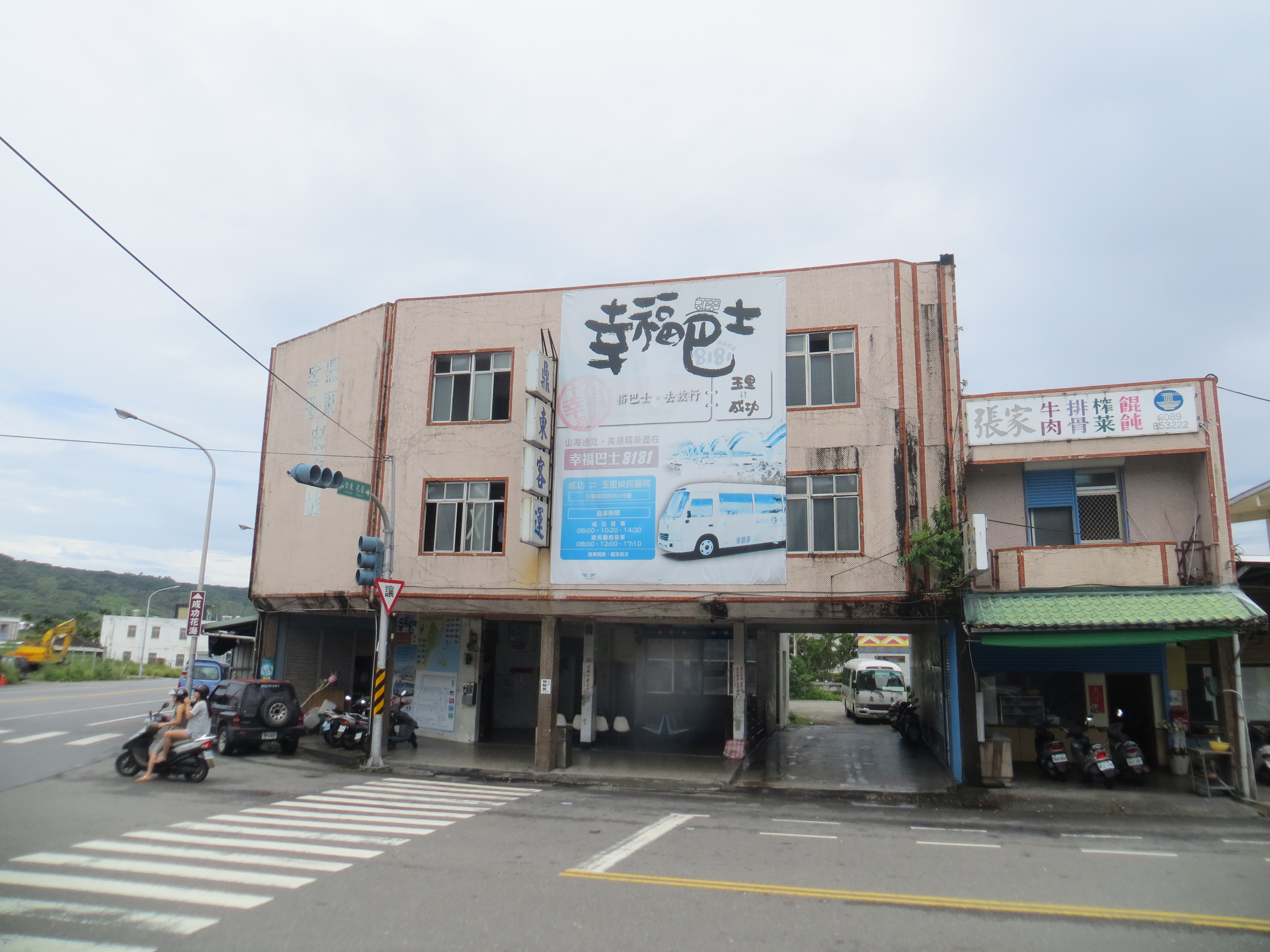 2016年8月12日，鼎東客運海線營運區成功站五權路側，可窺見其候車暨售票、儲車空間；前方馬路為五權路，左側為省道臺11線。